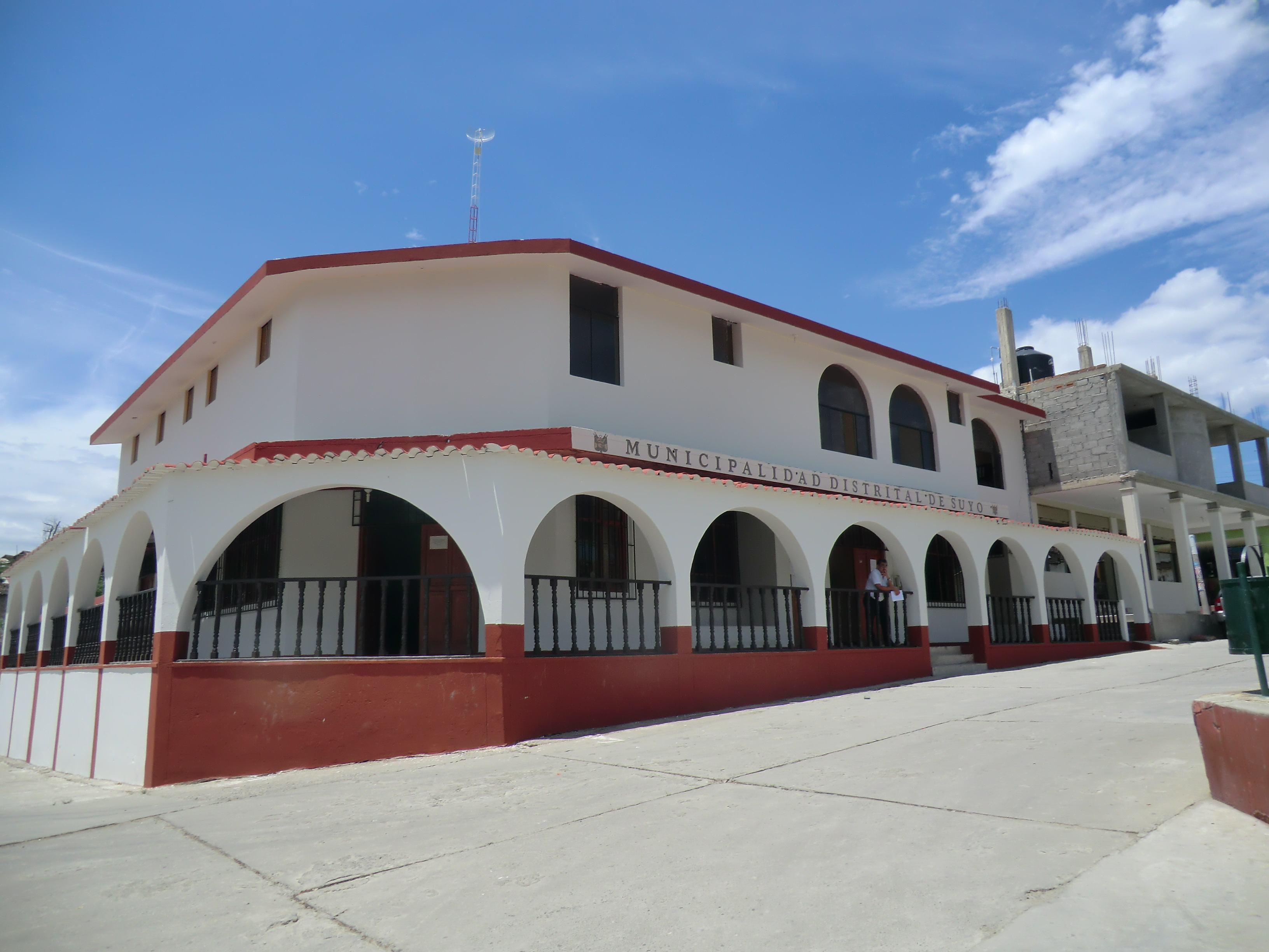 Municipalidad Distrital de Suyo